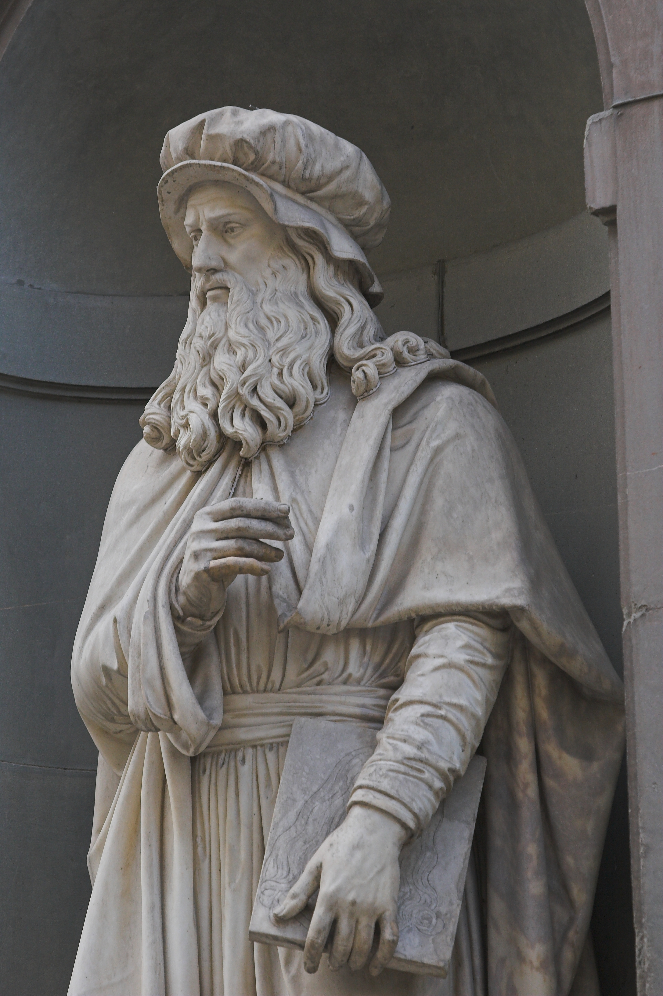 Firenze, Loggiato degli Uffizi, Statue degli „Illustri Toscani“, Statua di Leonardo da Vinci di Luigi Pampaloni.